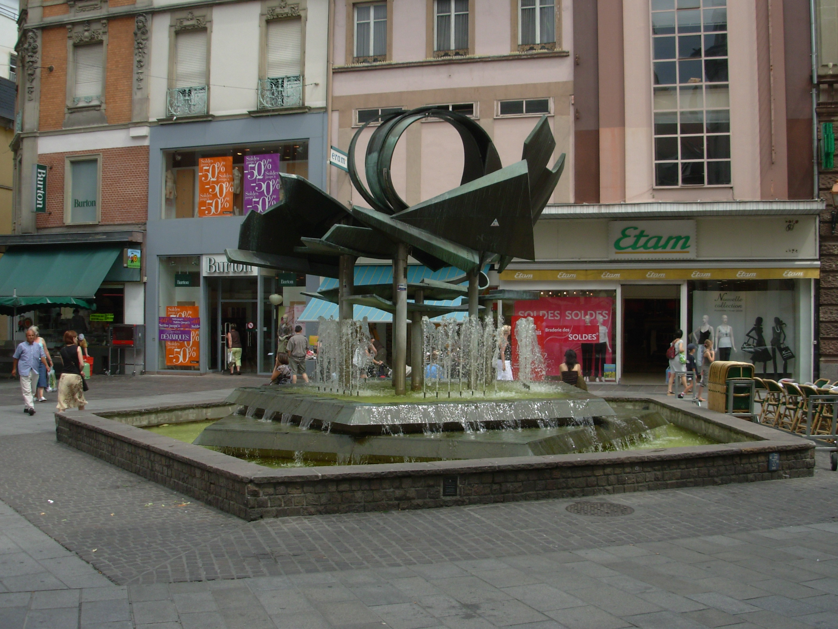 Rue du Sauvage, Mulhouse, Alsace, France - La fontaine dite "l'oiseau de feu" dont les ailes apparaissent lorsque le soleil se reflète sur les structures métalliques, est au centre de la place des Victoires. La place des Victoires est située au milieu de la rue du Sauvage.